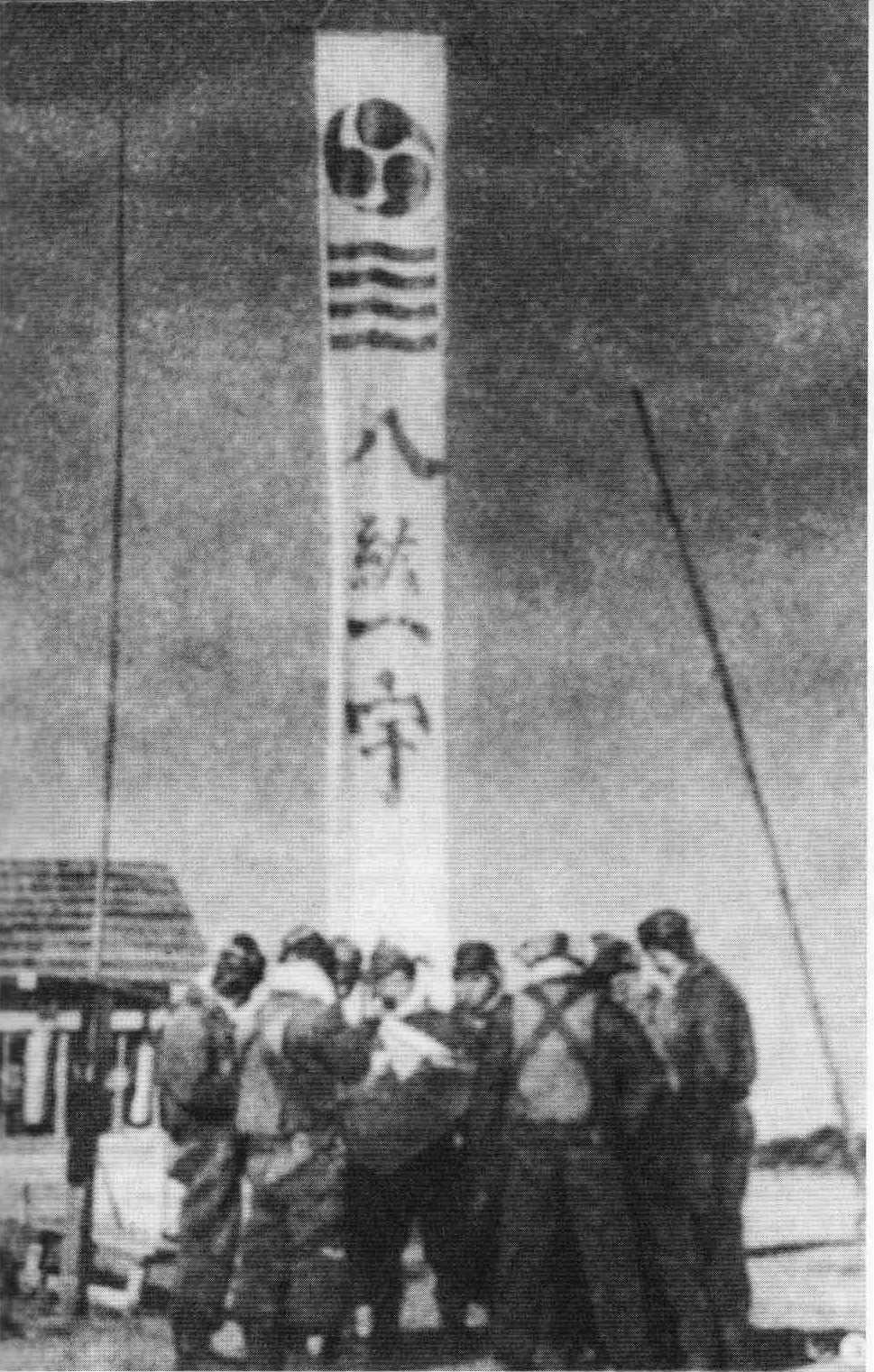 日本航空隊基地に掲げられた「八紘一宇」の旗印と航空兵。「八紘一宇」とは引用元のキャプションによれば「肇国の精神にのっとた八紘一宇の実現」として戦争遂行のスローガンになっていたという。